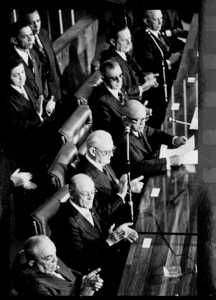 Posse do presidente Ernesto Geisel e de seu vice Adalberto Pereira dos Santos, em 15 de março de 1974, em sessão conjunta do Congresso Nacional, presidida pelo senador Paulo Torres.